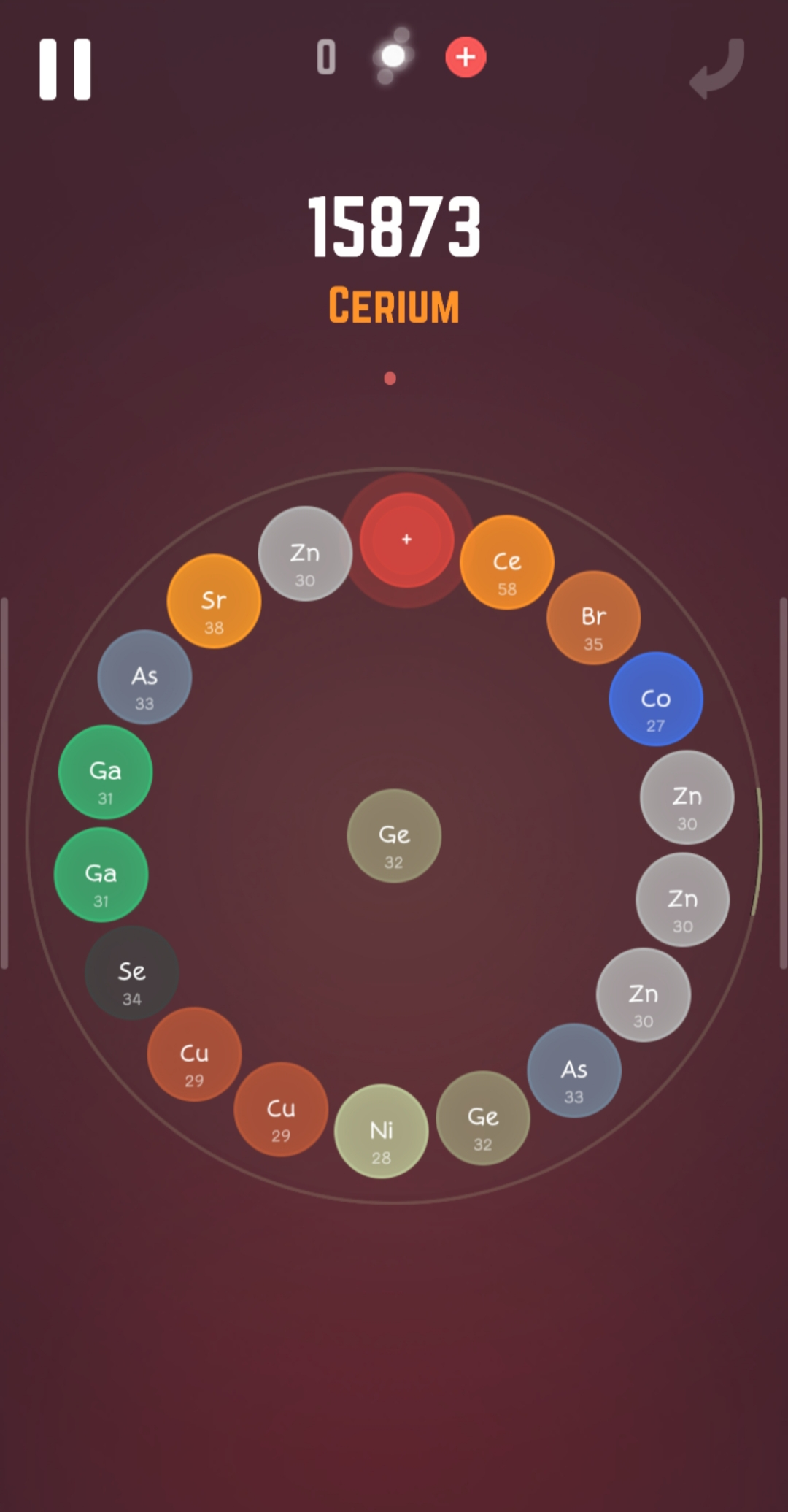 원자 개수를 유지를 못하면 이렇게 된다.